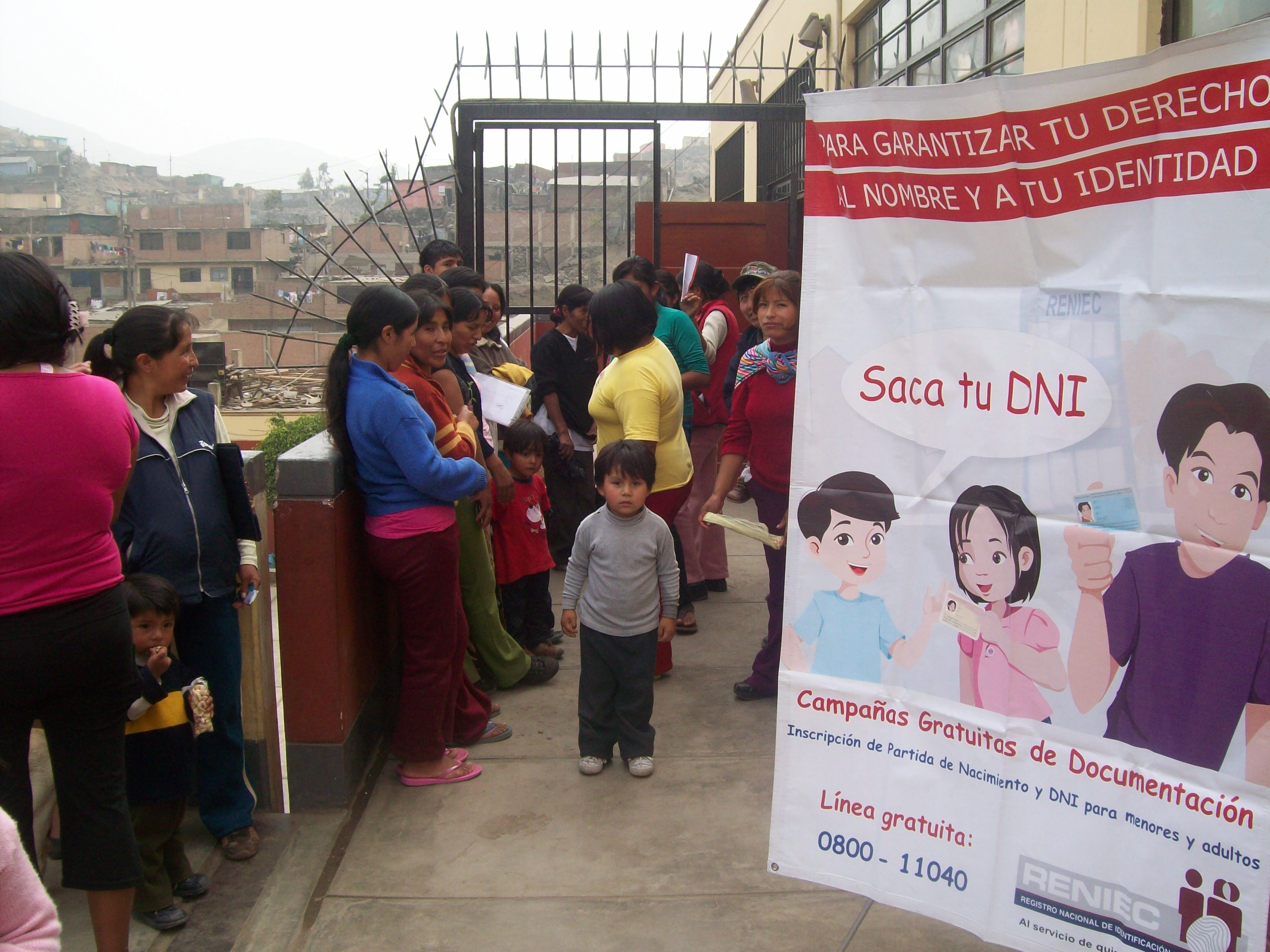 Campaña de documentación del Reniec en un colegio nacional de Lima